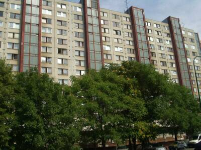 Dom na Rovniankovej ulici č. 14 v Bratislave - Petržalke